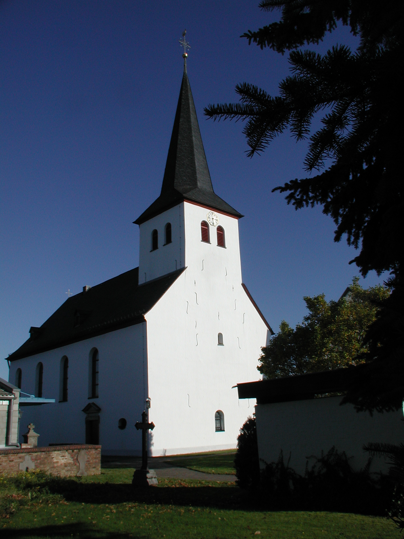 St. Markus, Bornheim-Rösberg